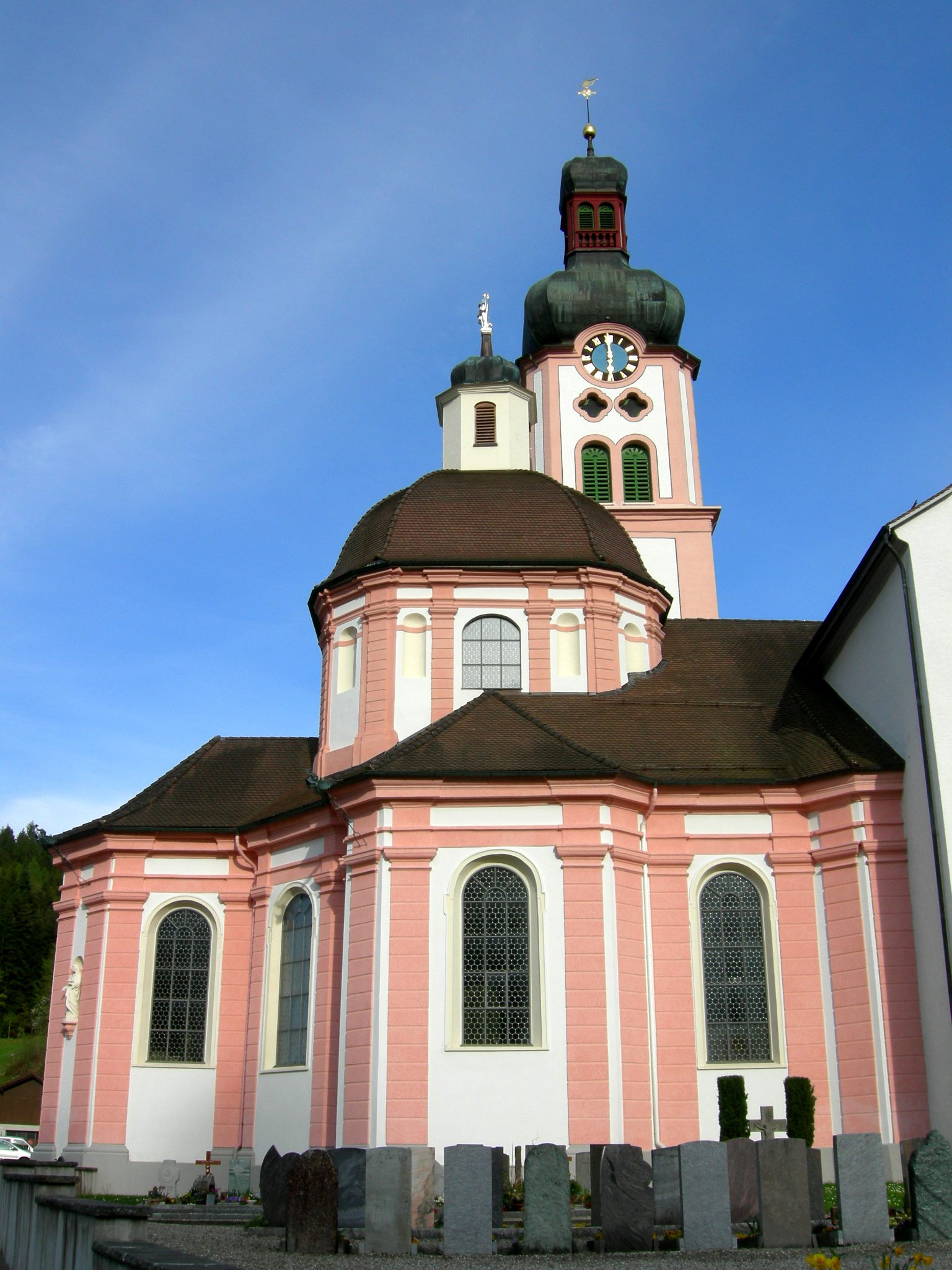 Fischingen, Idakapelle